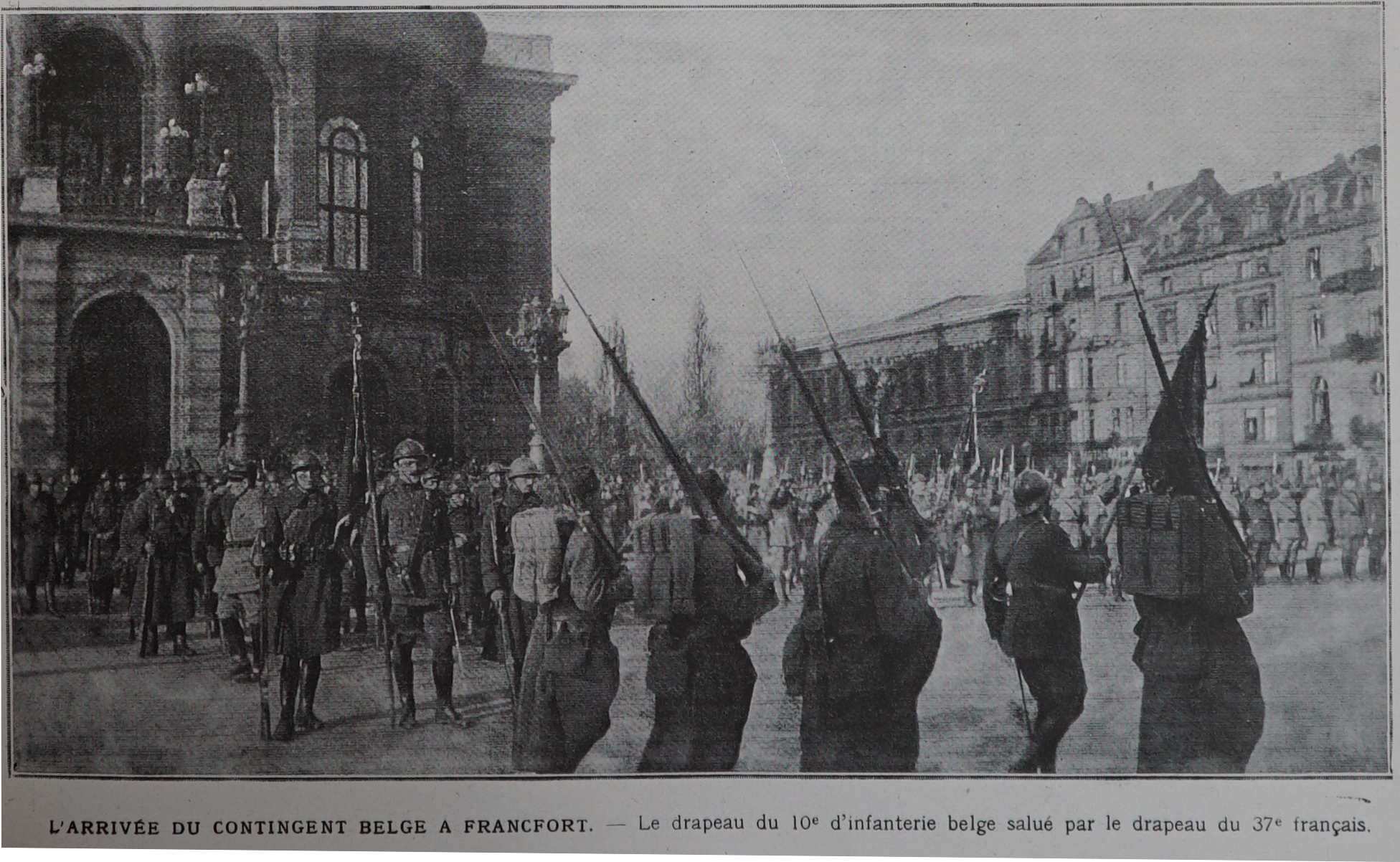 tiré du journal l'Illustration de 1920.